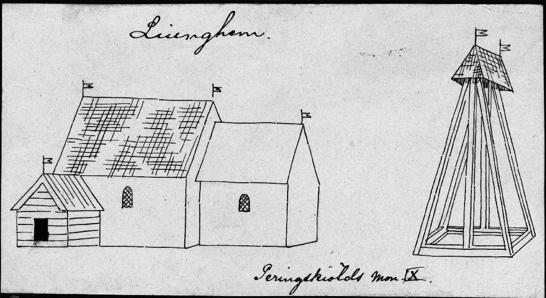 Kyrkan och klockstapeln från sydöst. Kopia efter teckning ur Peringskiölds Monumenta. Kategori: (01) ExteriörerKyrkan och klockstapeln från sydöst. Kopia efter teckning ur Peringskiölds Monumenta.